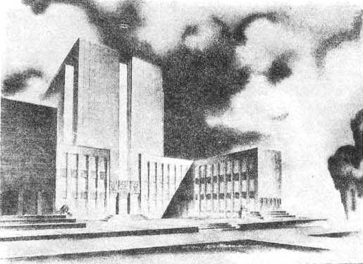 Проект будинку Музею землі поморської. Створений для першого конкурсу 1935 року, який не відбувся. Архітектор Чеслав Пшибильський (1880—1936).